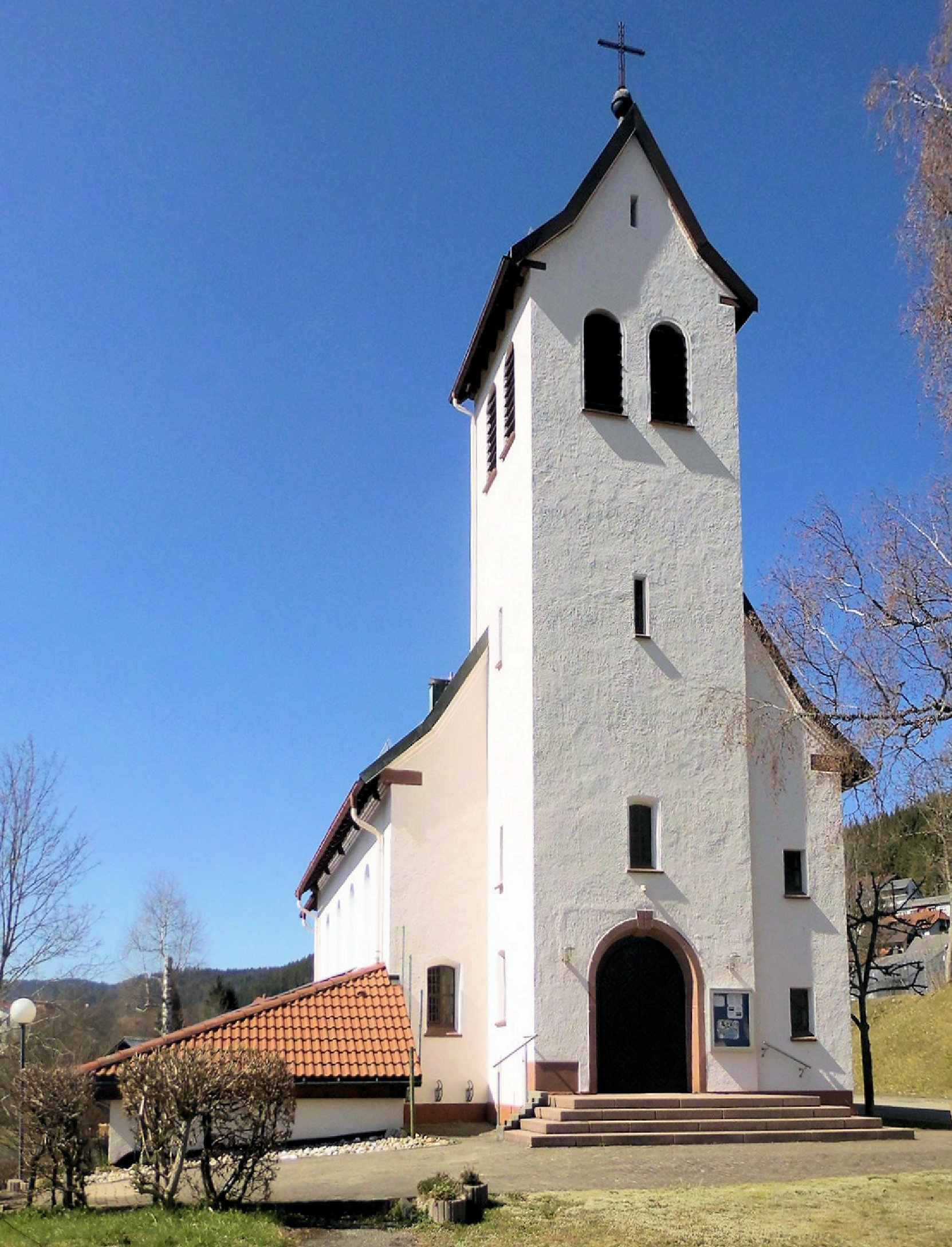 Christuskirche in Lenzkirch, Baden-Württemberg